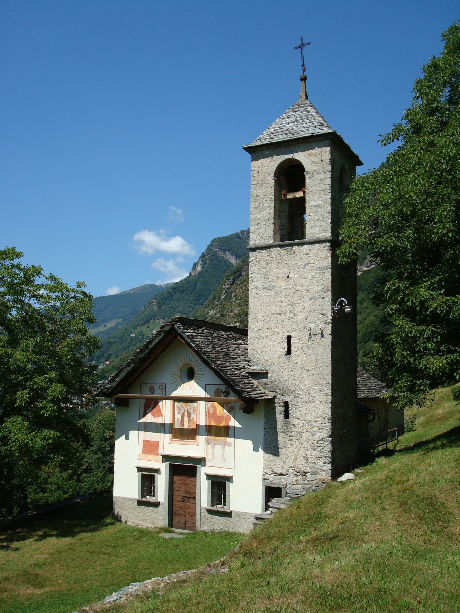 Cappella del Bairone a Mosogno in Canton Ticino, Svizzera